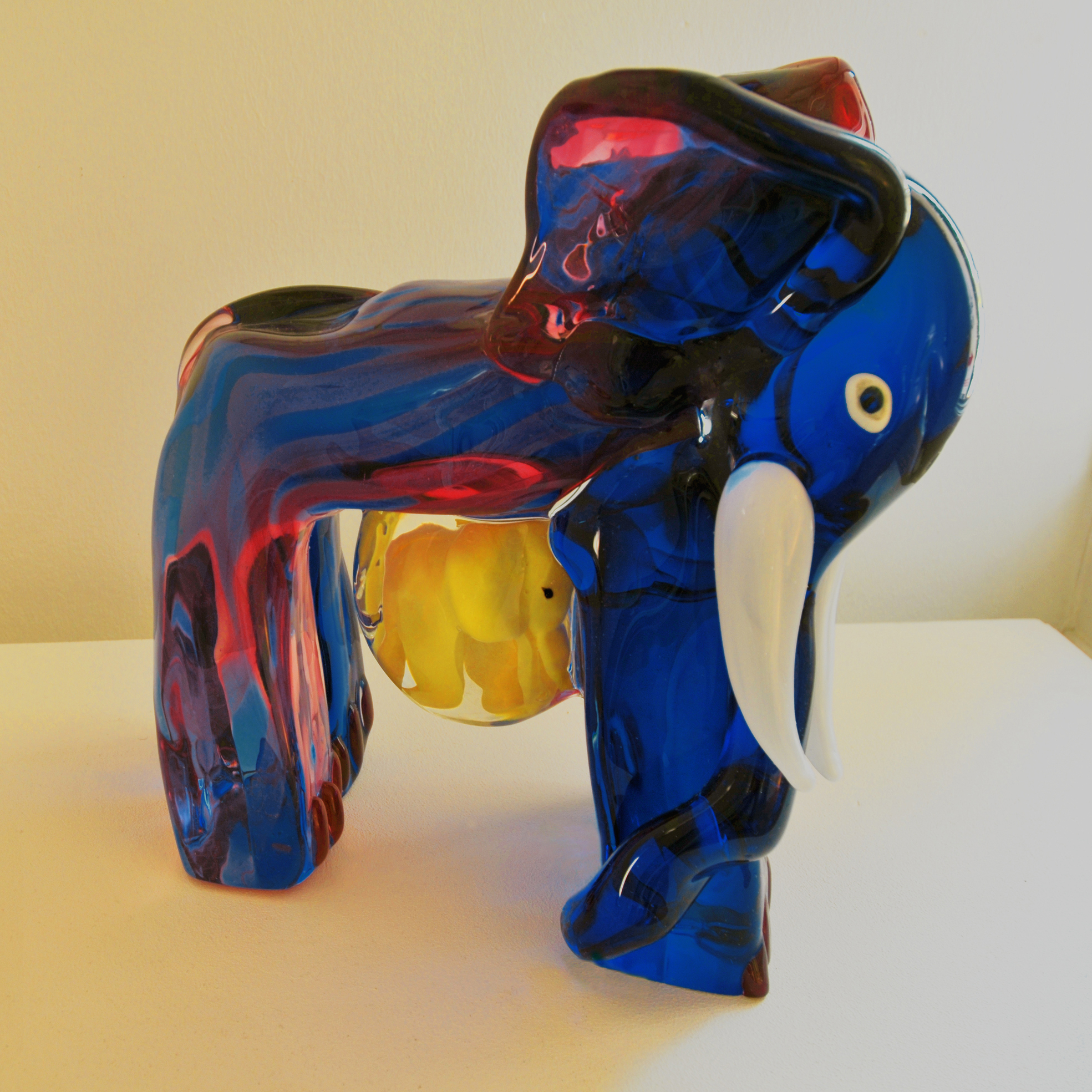 Zu den frühesten Kindheitserinnerungen von Adi Holzer gehört der Jahrmarkt der Stadt Stockerau. Dort stand er als Kind staunend vor dem Elefanten, der aus seiner Perspektive riesig anzusehen war. Der Elefant wurde später zu einem Thema seines Kunstschaffens. Seit Dezember 2005 schuf er in Murano bei Venedig in Zusammenarbeit mit Adriano Berengo und mit dessen hochqualifizierten Glasbläsern Glasskulpturen. Dort entstand im Jahr 2011 diese Glasskulptur von einer Elefantin mit ihrem Embryo. Durch verschiedenfarbiges Glas gewinnt die durchsichtige Elefantin ein faszinierendes Aussehen.